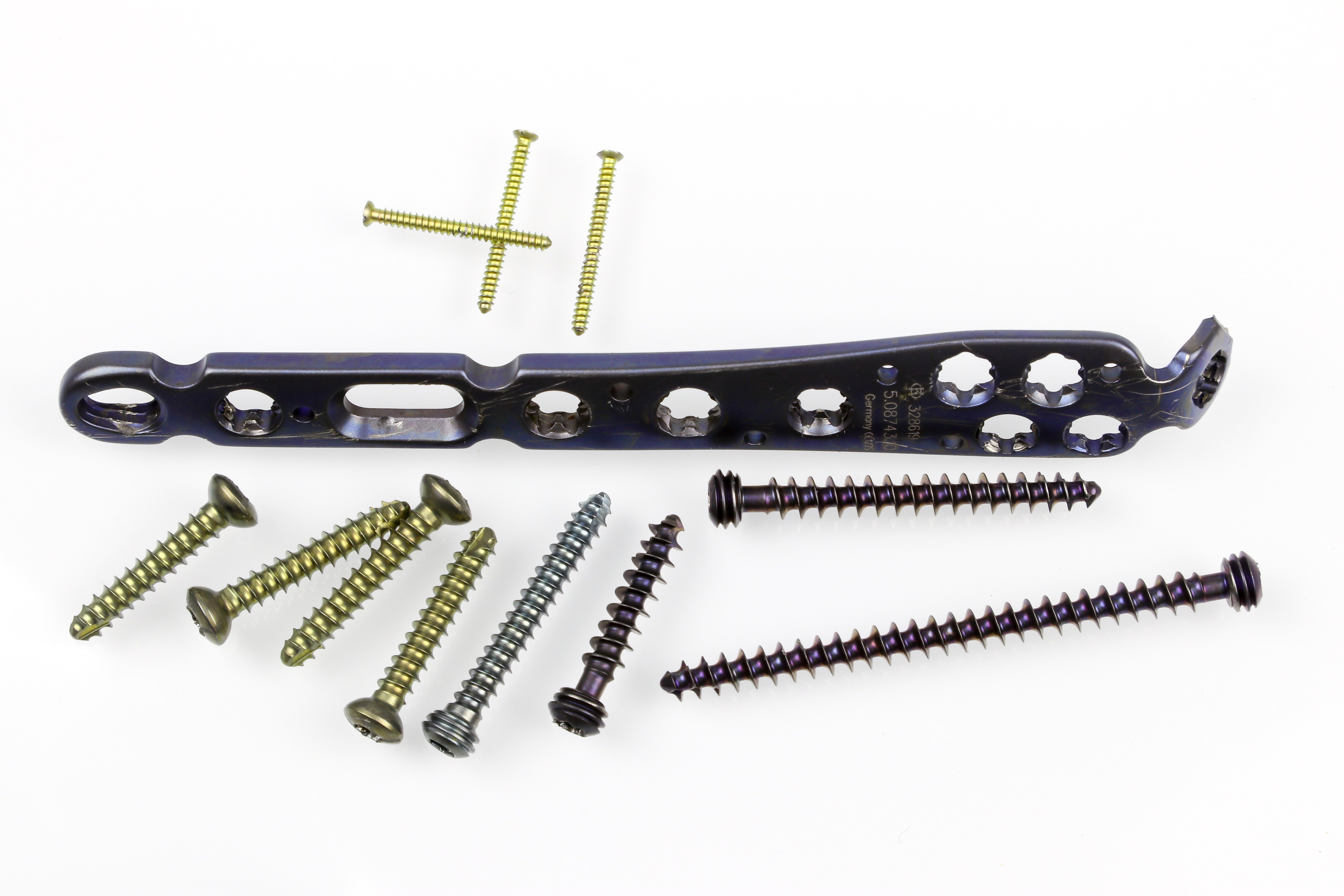 Entferntes Osteosynthesematerial, eingesetzt nach Monteggia-Fraktur (Winkelstabile Platte (Variabel winkelstabile Olecranonplatte des Herstellers Königsee Implantate GmbH), Schrauben)